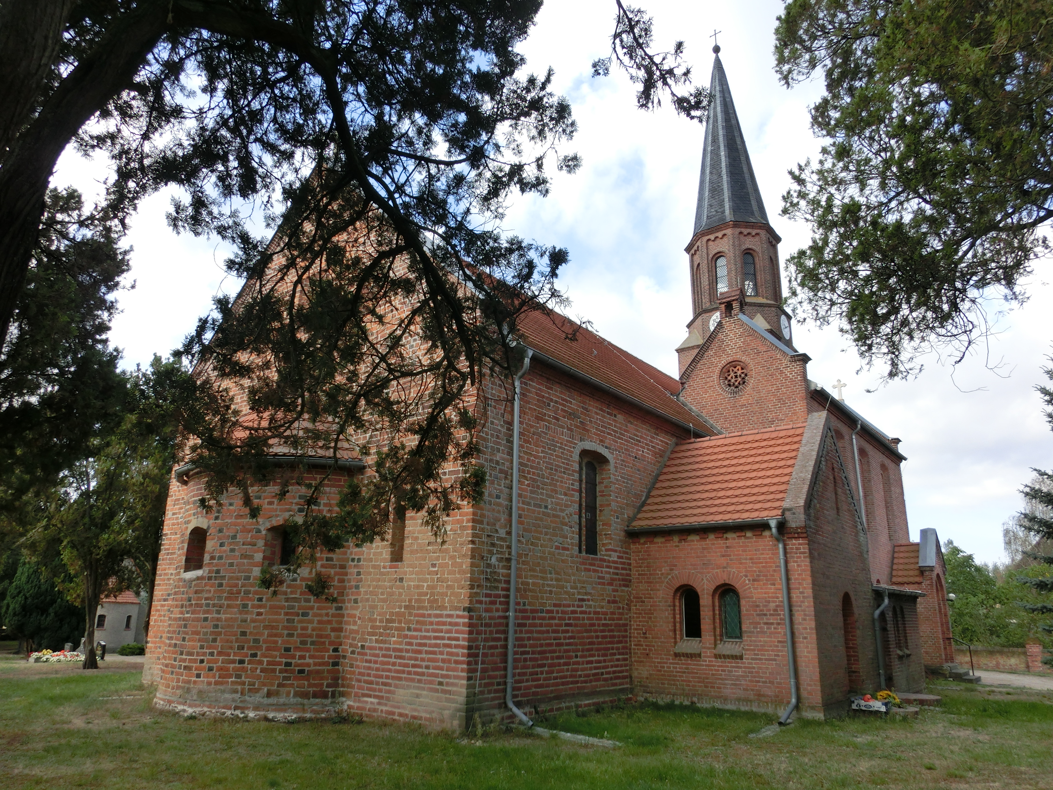 Baudenkmal, Erfassungsnummer 094 50278, Aufnahme aus Nordosten